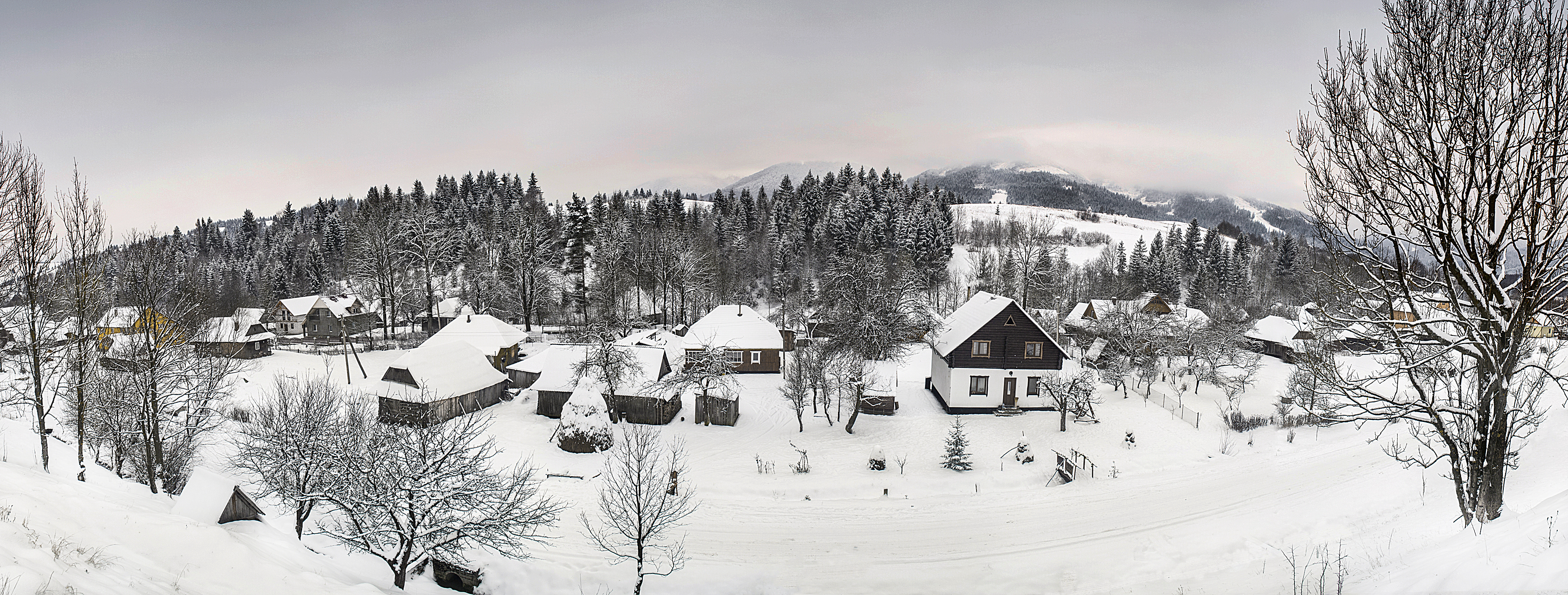 «Боржава», Виноградівський р-н ДП «Виноградівське ЛГ», Шаланківське л-во, квартал 1 (виділ 1-10), квартал 4 (виділ 1-9), квартал 7 (виділ 1-7), квартал 11 (виділ 1-7, 32, 33), квартал 14 (виділ 1-11)